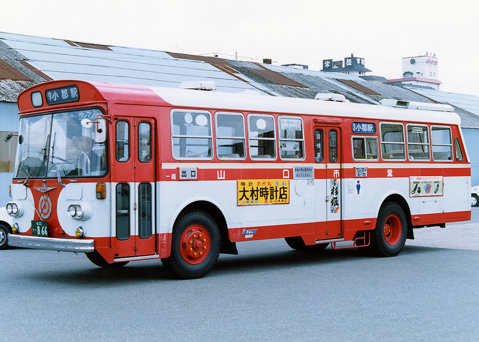 山口市交通局 三菱ふそう MR410 西工42MC